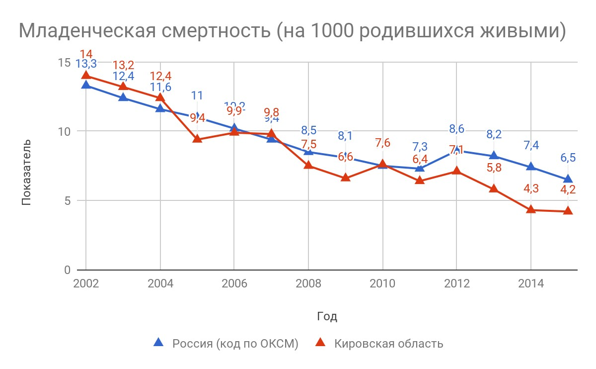 Показатель